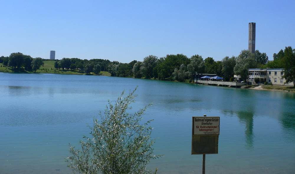 Lerchenauer See mit Blick nach Südwesten